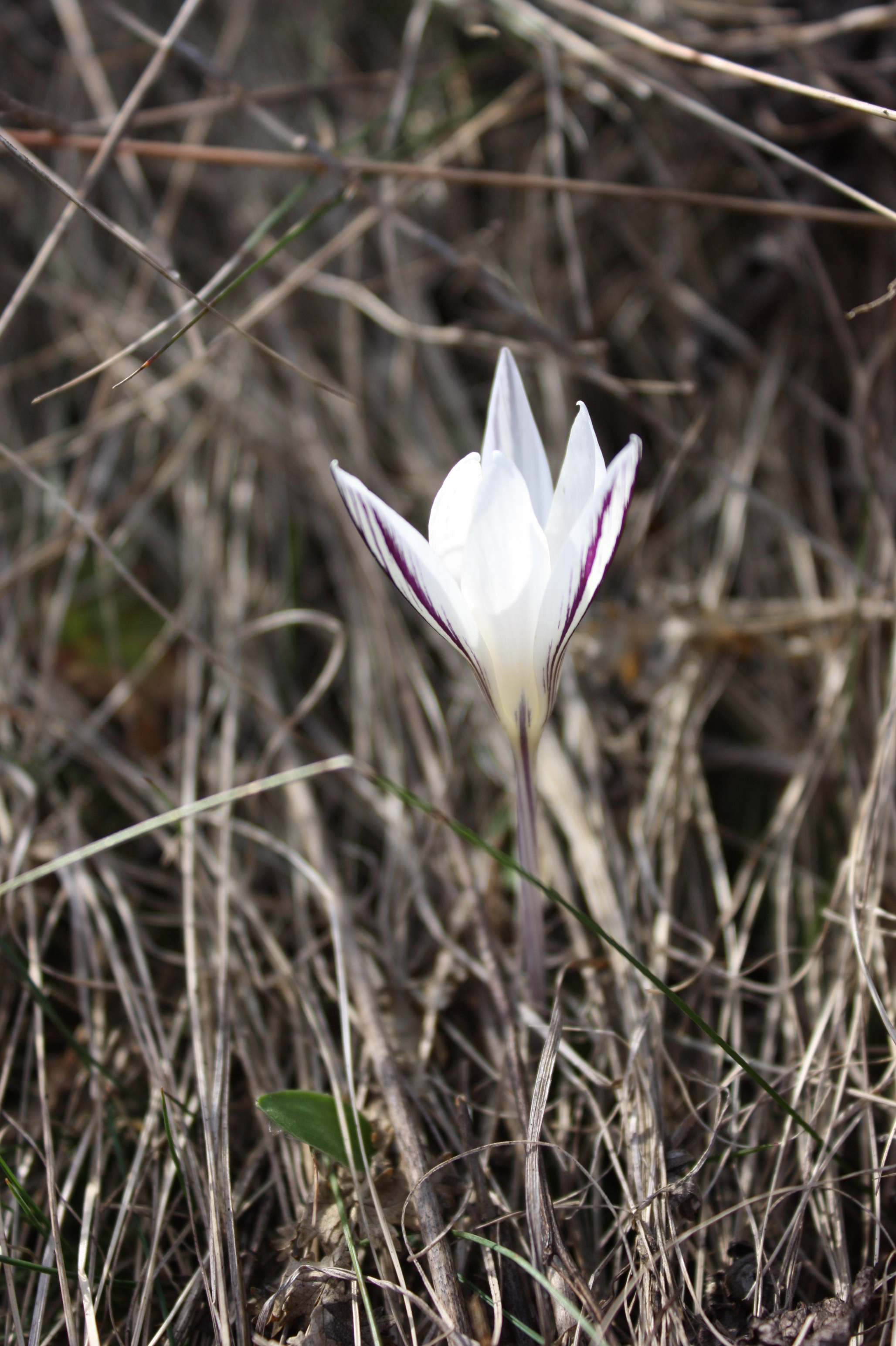 Долина Миколи Чудотворця, Уманський район, В адмінмежах Коржовокутської сільської ради